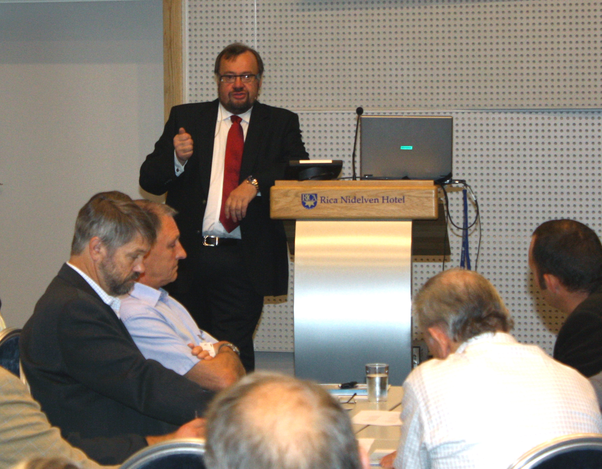 Marvin Wiseth, tidligere Trondheim-ordfører og nåværende kommunikasjonsdirektør i Sparebank 1 Midt-Norge, holdt innlegg om kommunikasjon.